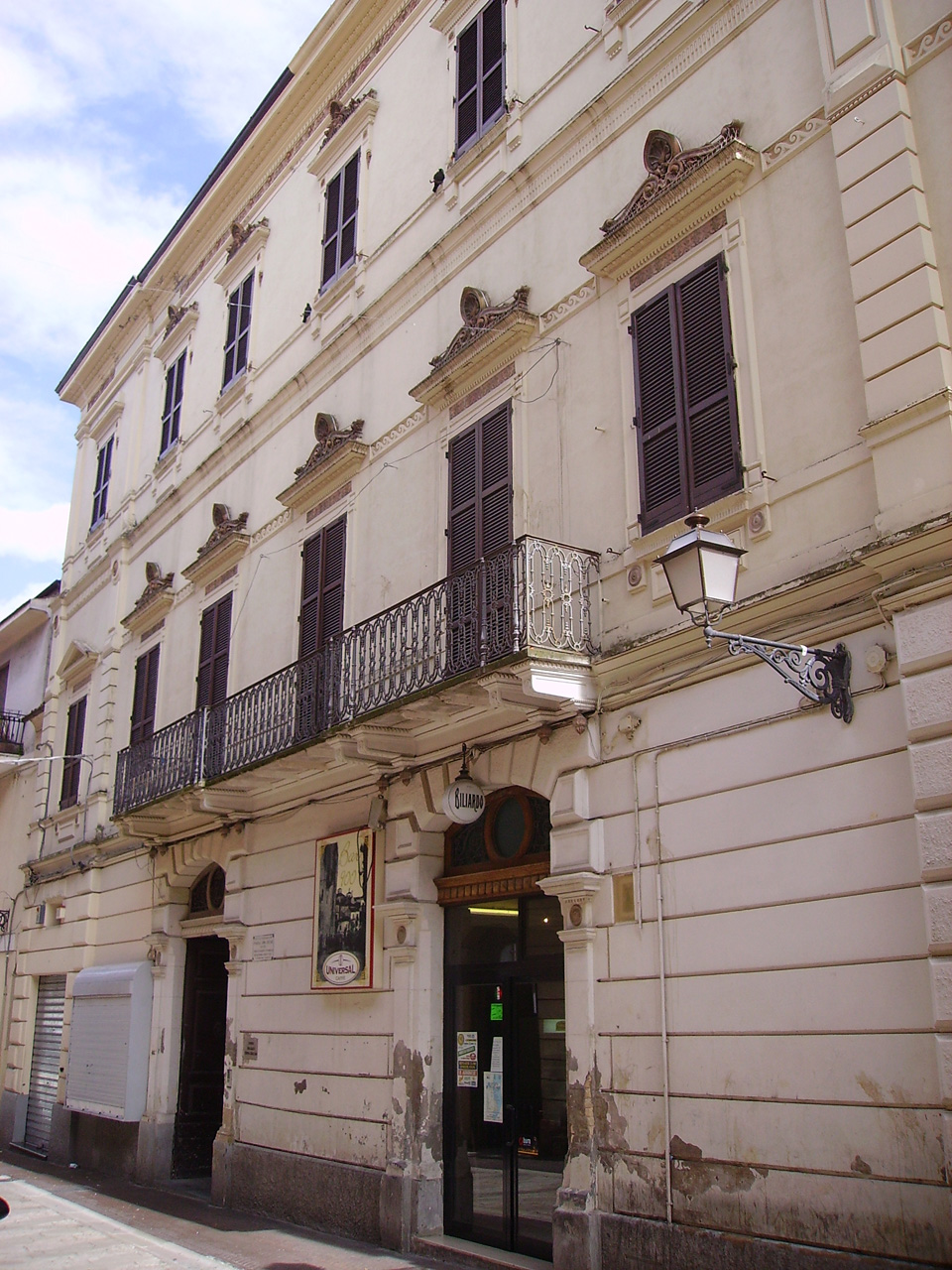 Città Sant'Angelo (PE), palazzo Coppa Zuccari